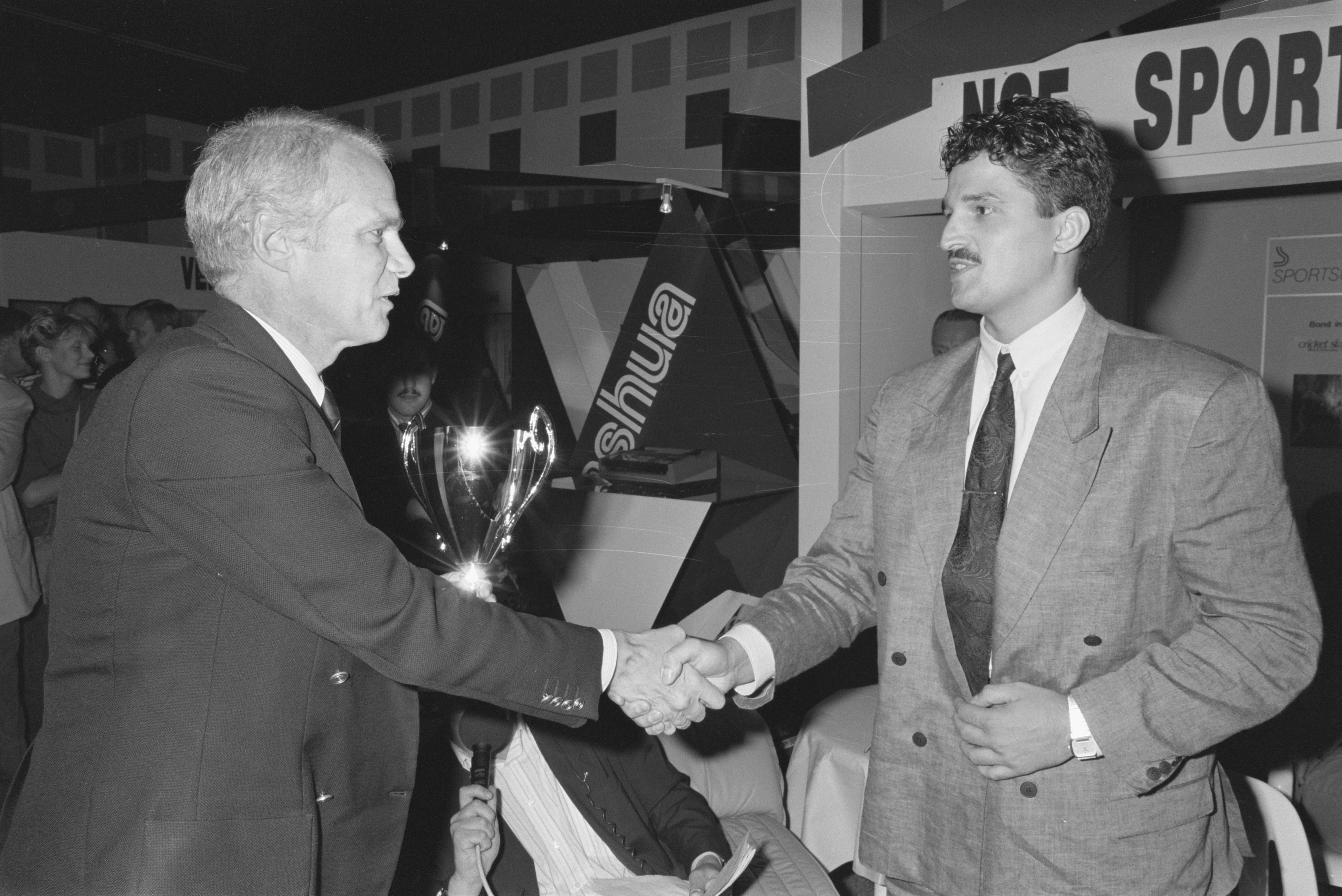 Collectie / Archief : Fotocollectie Anefo Reportage / Serie : [ onbekend ] Beschrijving : Opdracht Limburgs Dagblad; Jacques Josten, handballer van het jaar 1988 Datum : 12 september 1988 Trefwoorden : Prijsuitreikingen, handballers Persoonsnaam : Jacques Josten Instellingsnaam : Limburgs Dagblad Fotograaf : Bogaerts, Rob / Anefo Auteursrechthebbende : Nationaal Archief Materiaalsoort : Negatief (zwart/wit) Nummer archiefinventaris : bekijk toegang 2.24.01.05 Bestanddeelnummer : 934-3124